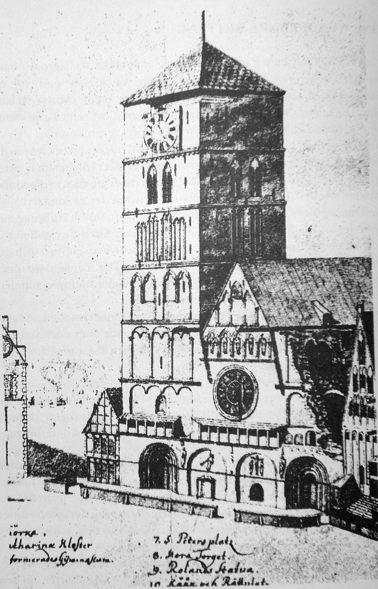 Stich eines schwedischen Zeichners vom Bremer Dom aus dem Jahre 1695. Vorstudie zu oder Ausschnitt von Erik Dahlbergs Huldigung Wrangels